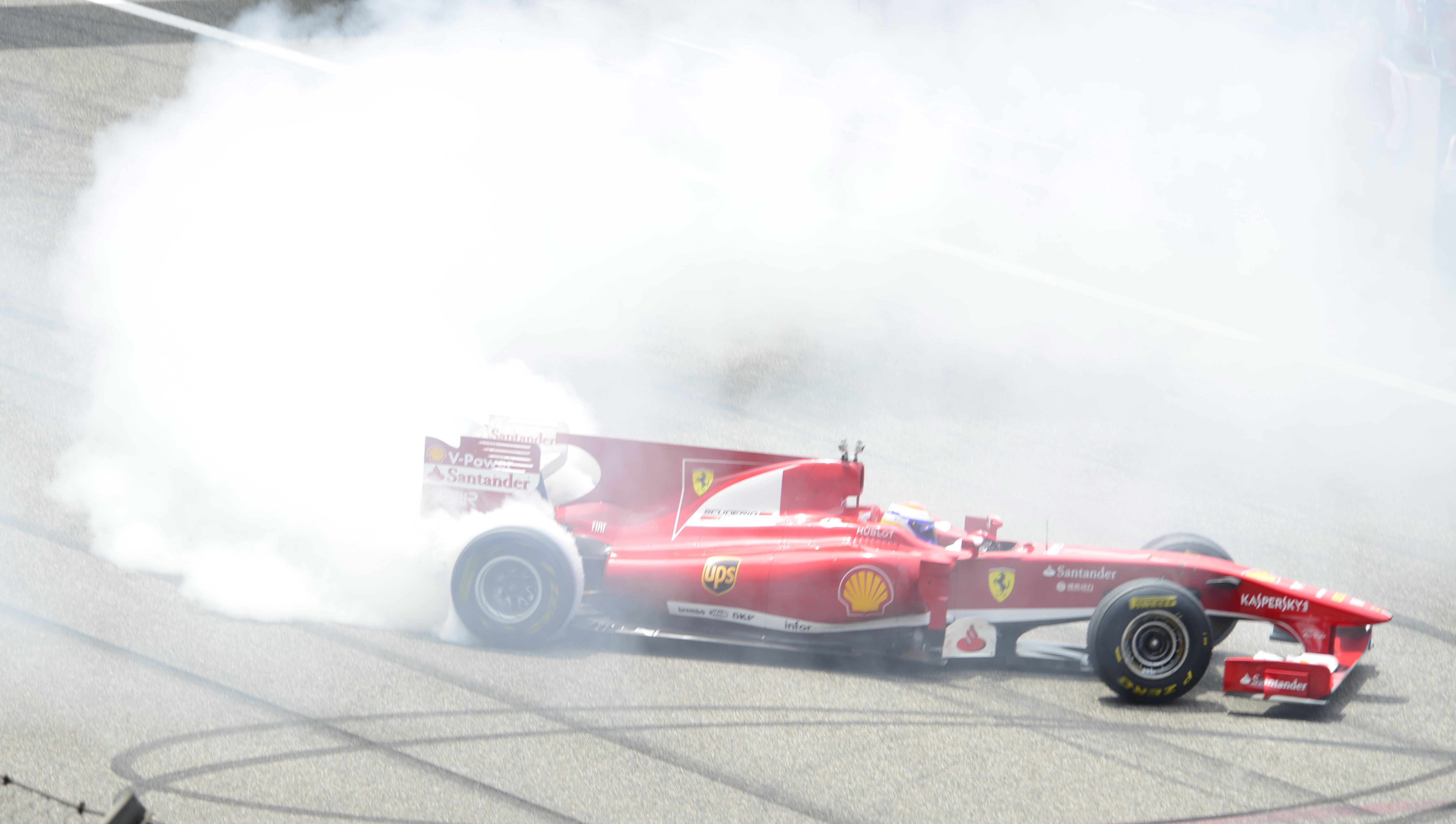 Burn Out